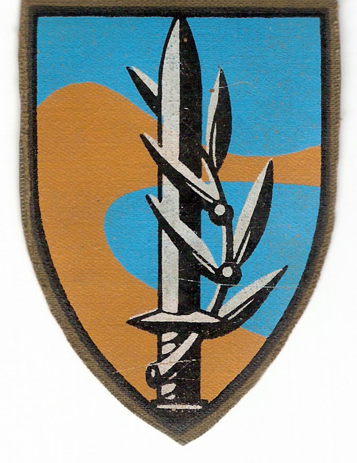 פיקוד מרש"ל - סמל ותג יחידה